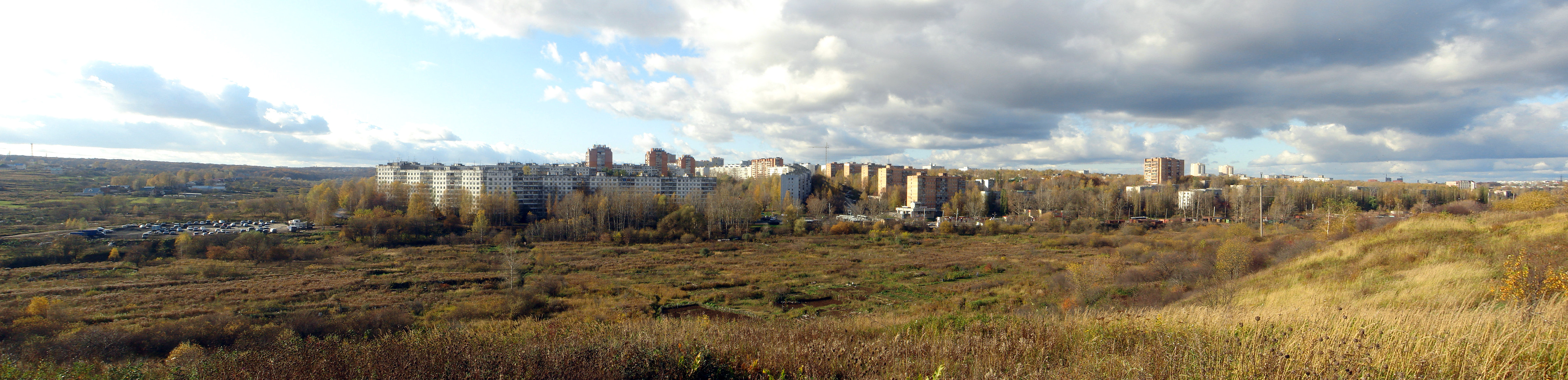 Микрорайон Кузнечиха, Нижний Новгород, Россия.